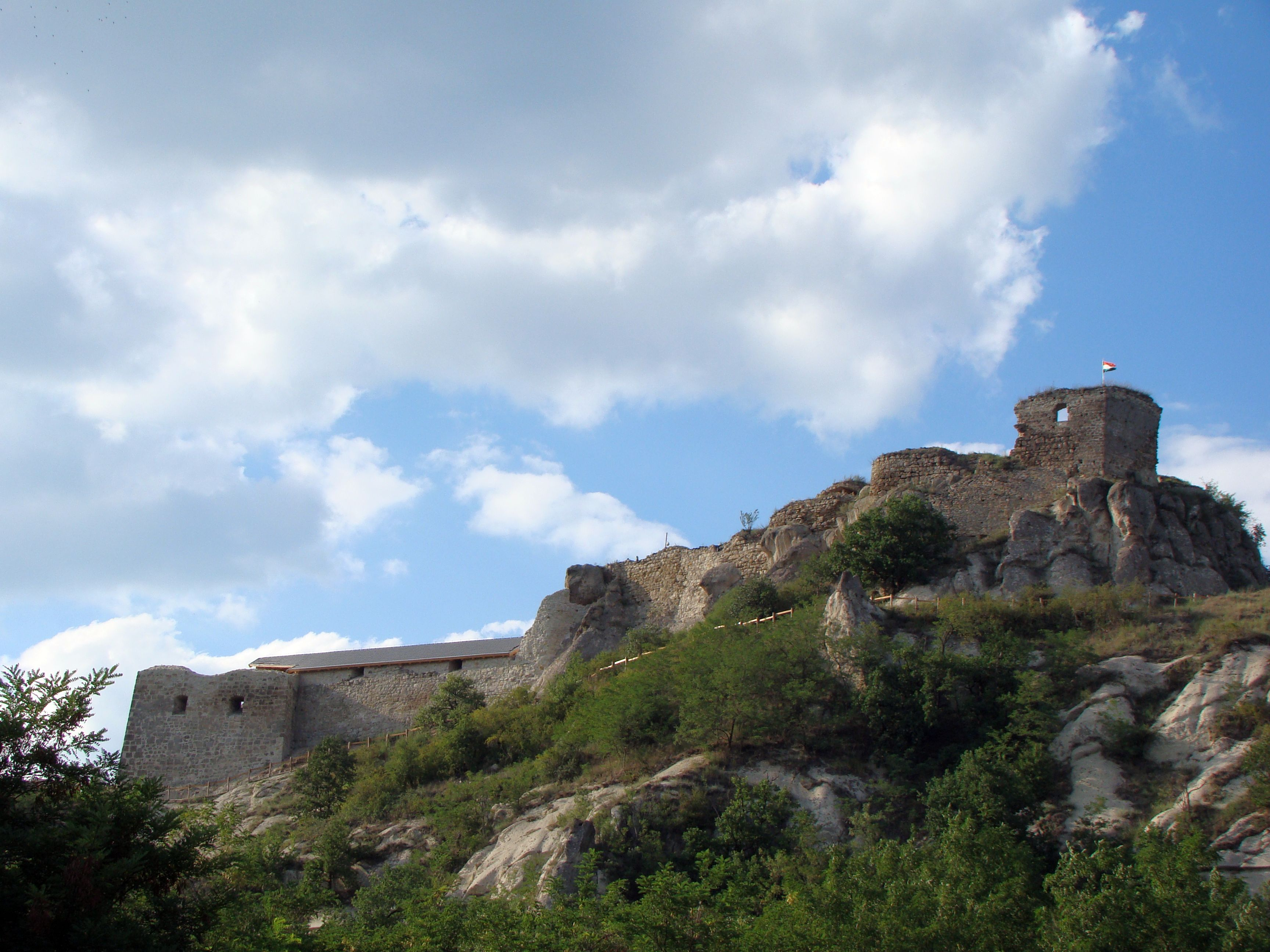 Várrom, Sirok This is a photo of a monument in Hungary. Identifier: 5838